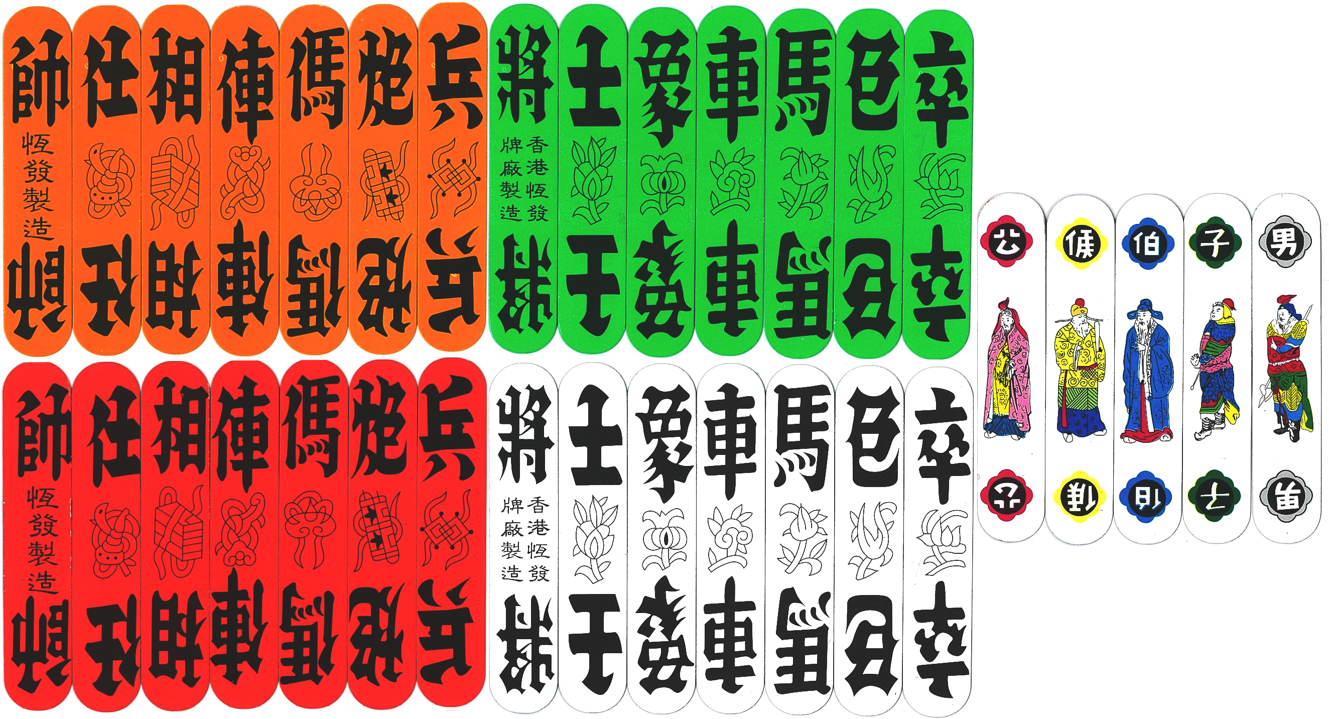 中文（台灣）: 潮州四色牌